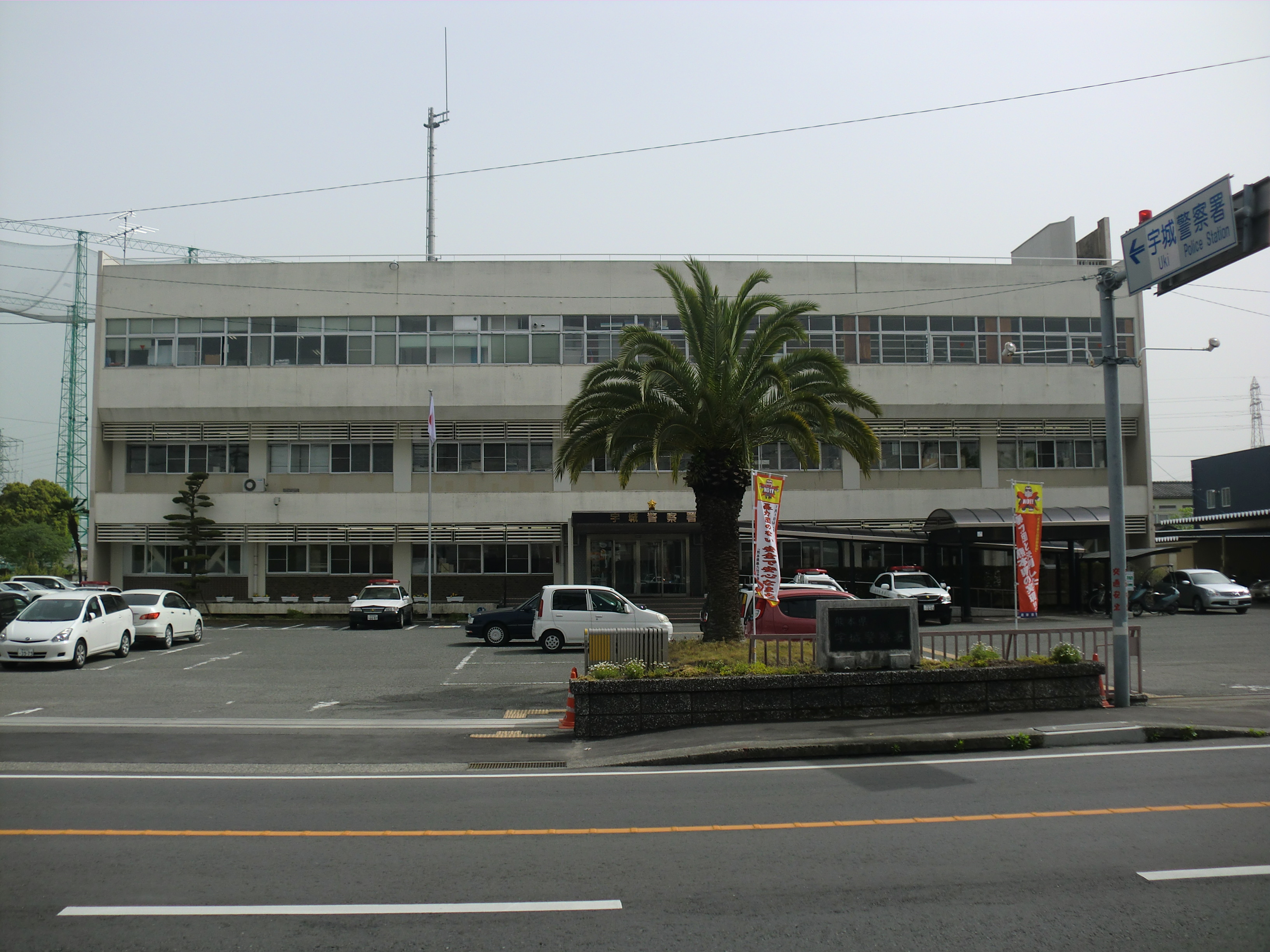 熊本県宇城市にある宇城（うき）警察署（旧：松橋（まつばせ）警察署）